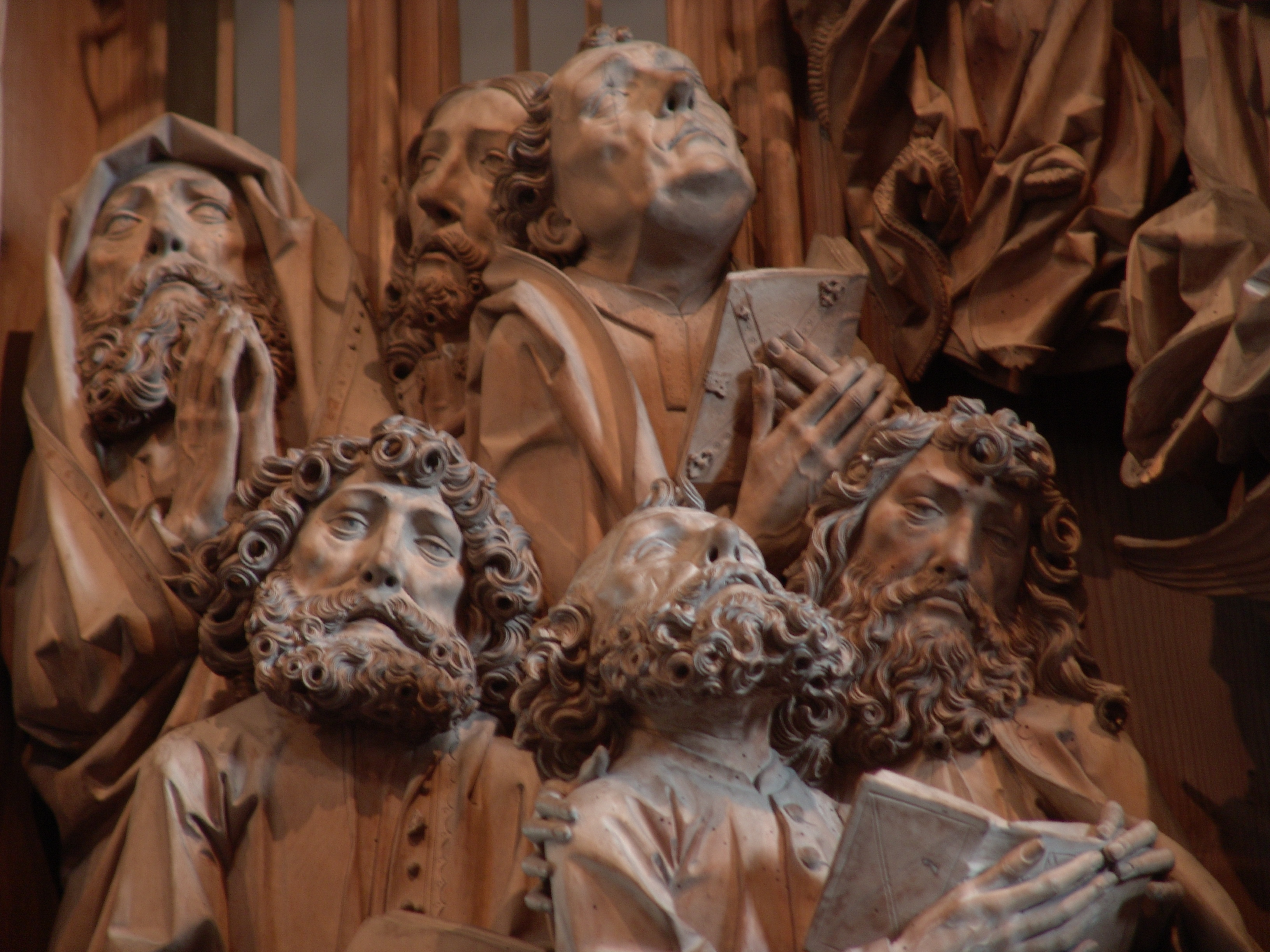 Marienretabel von Tilman Riemenschneider